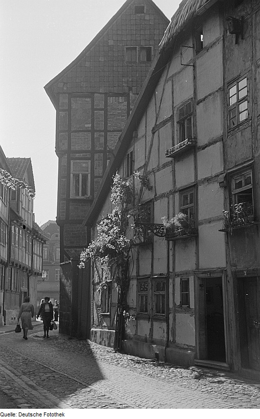 Original image description from the Deutsche Fotothek Gasse mit Fachwerkhäusern in der Altstadt